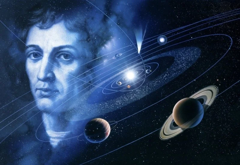 Татарча/tatarça: Ауропа гыйлем инкыйлабы (XVI-XVII гасырлар), Коперник идеяләре